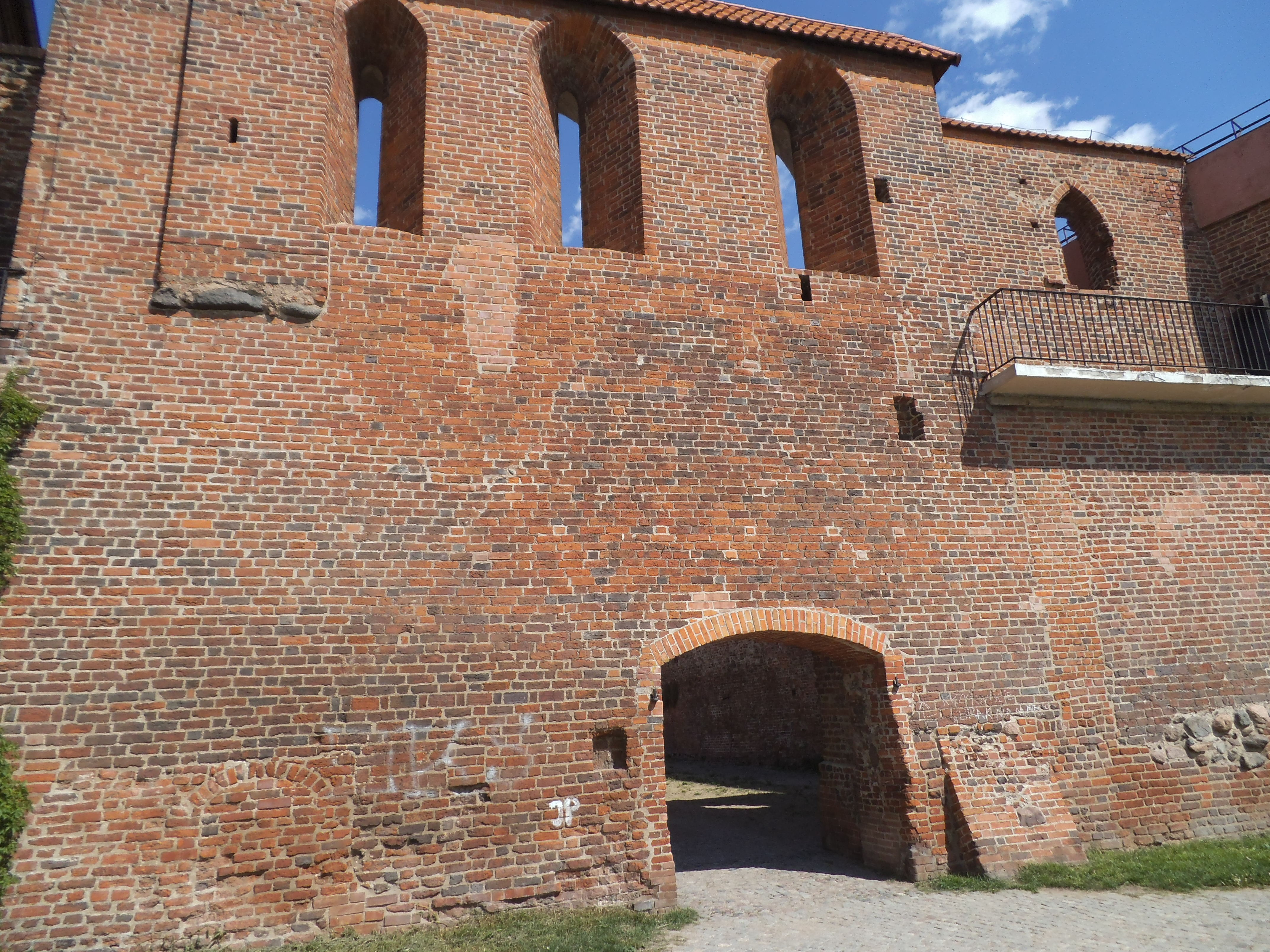 Ruiny zamku krzyżackiego w Toruniu